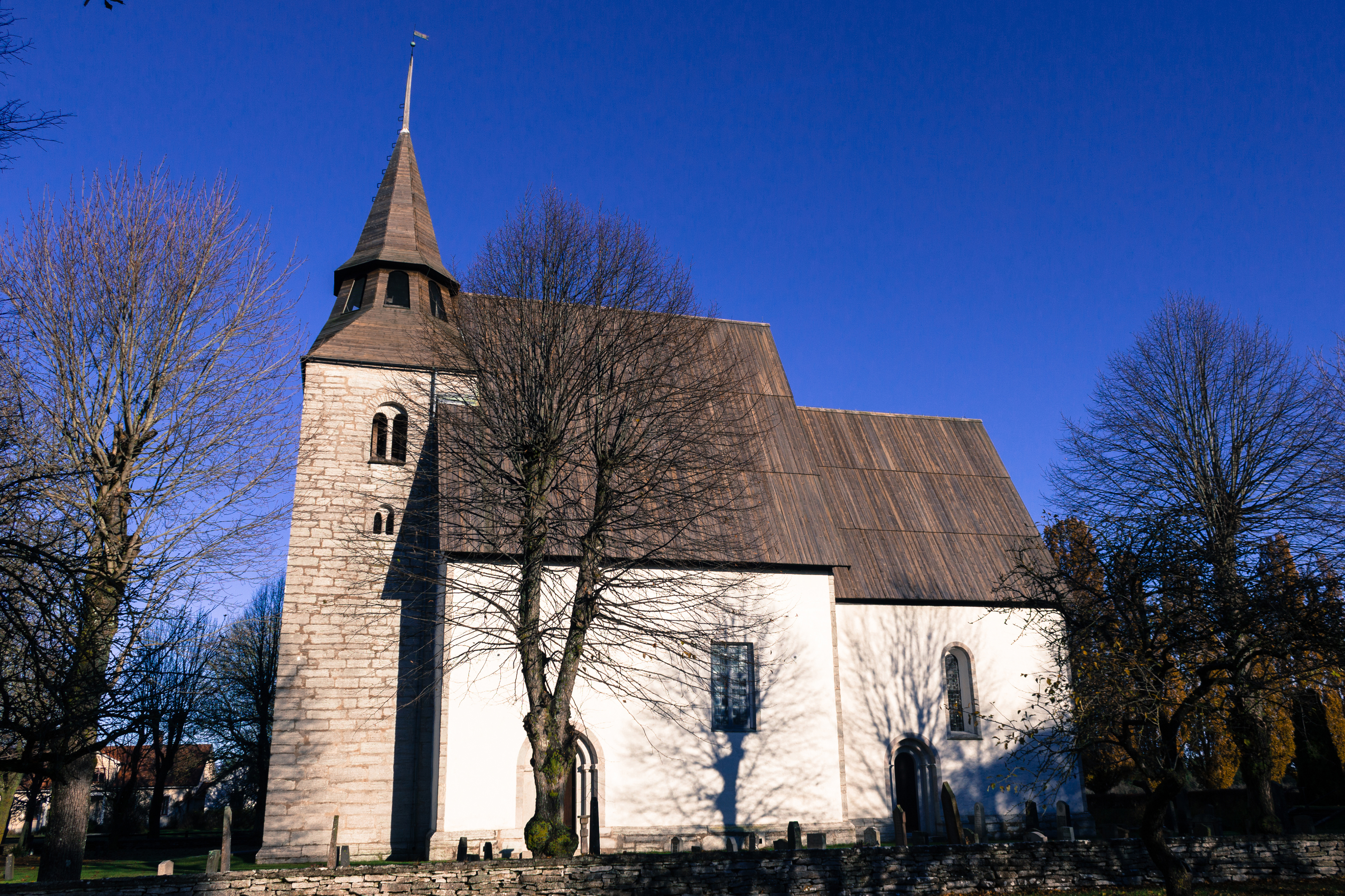 Igrexa de Sjonhem, na illa sueca de Gotland.